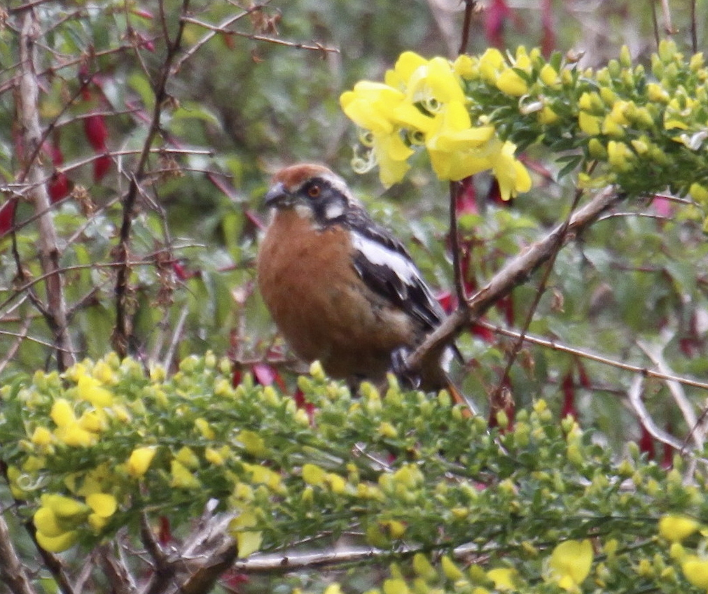 Puerto Chacabuco, Chile